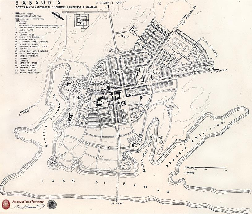 Sabaudia, veduta d'insieme, disegno dal progetto, 1933